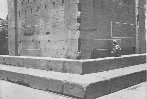 بنای کعبه‌ی زرتشت و کتیبه‌ی شاپور بر دیوار آن